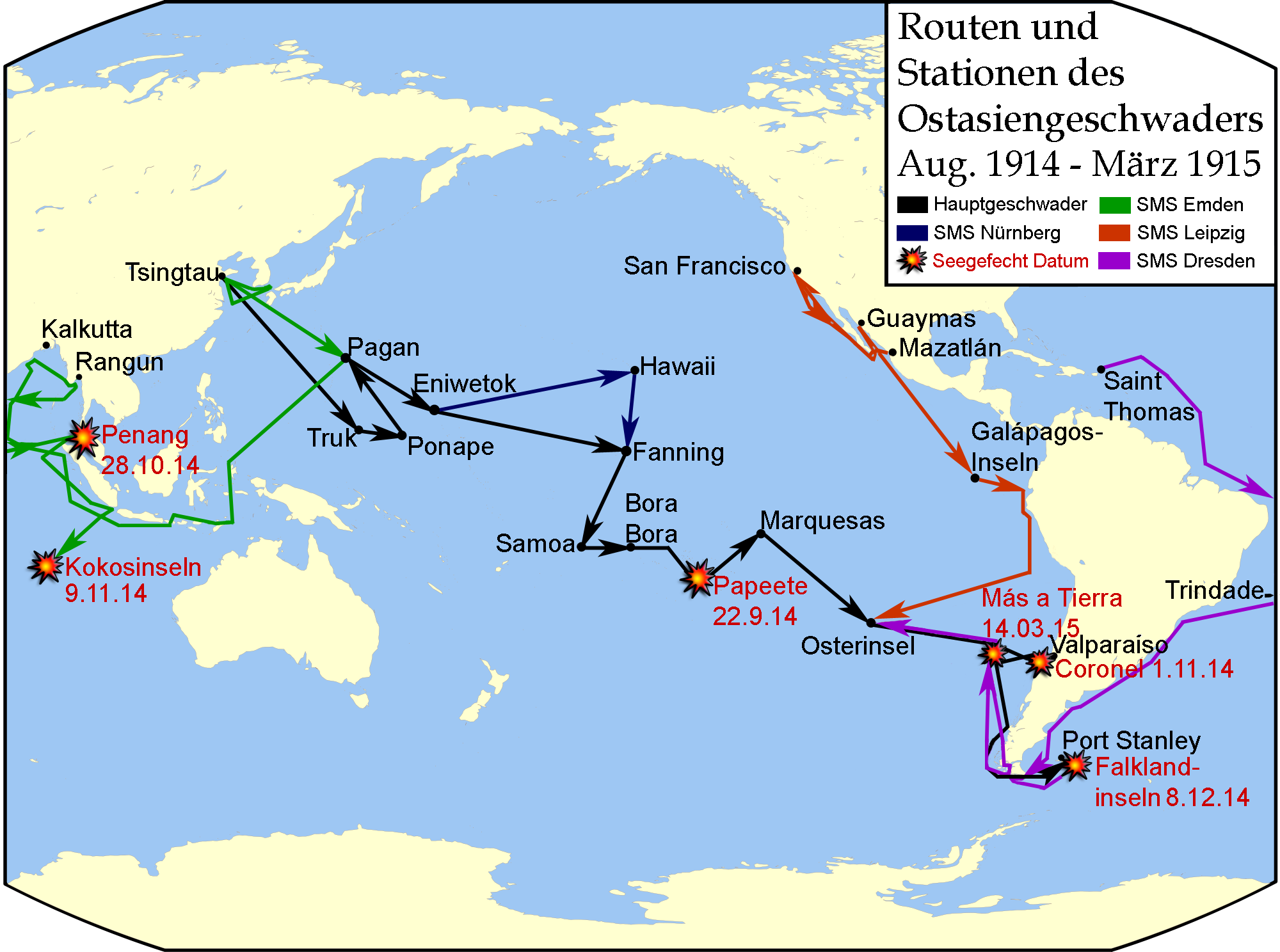 Routen und Stationen des Ostasiengeschwaders von August 1914 bis März 1915 (mit Seegefechten)